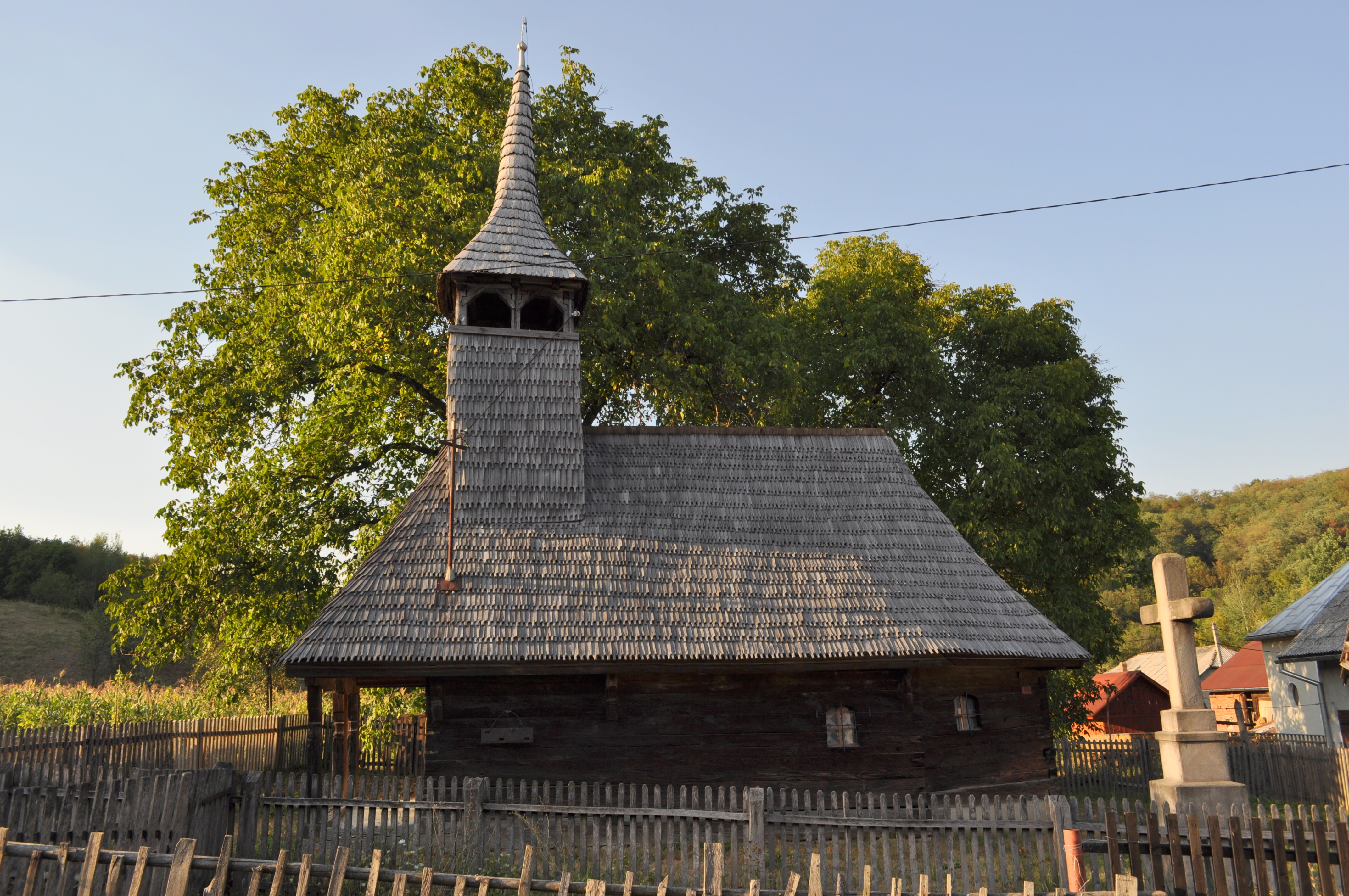 Biserica de lemn "Cuvioasa Paraschiva" , sat STEJERA; comuna MIREŞU MARE